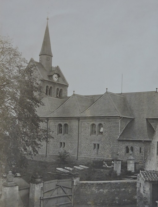 Kirche Nordgermersleben außen 1906